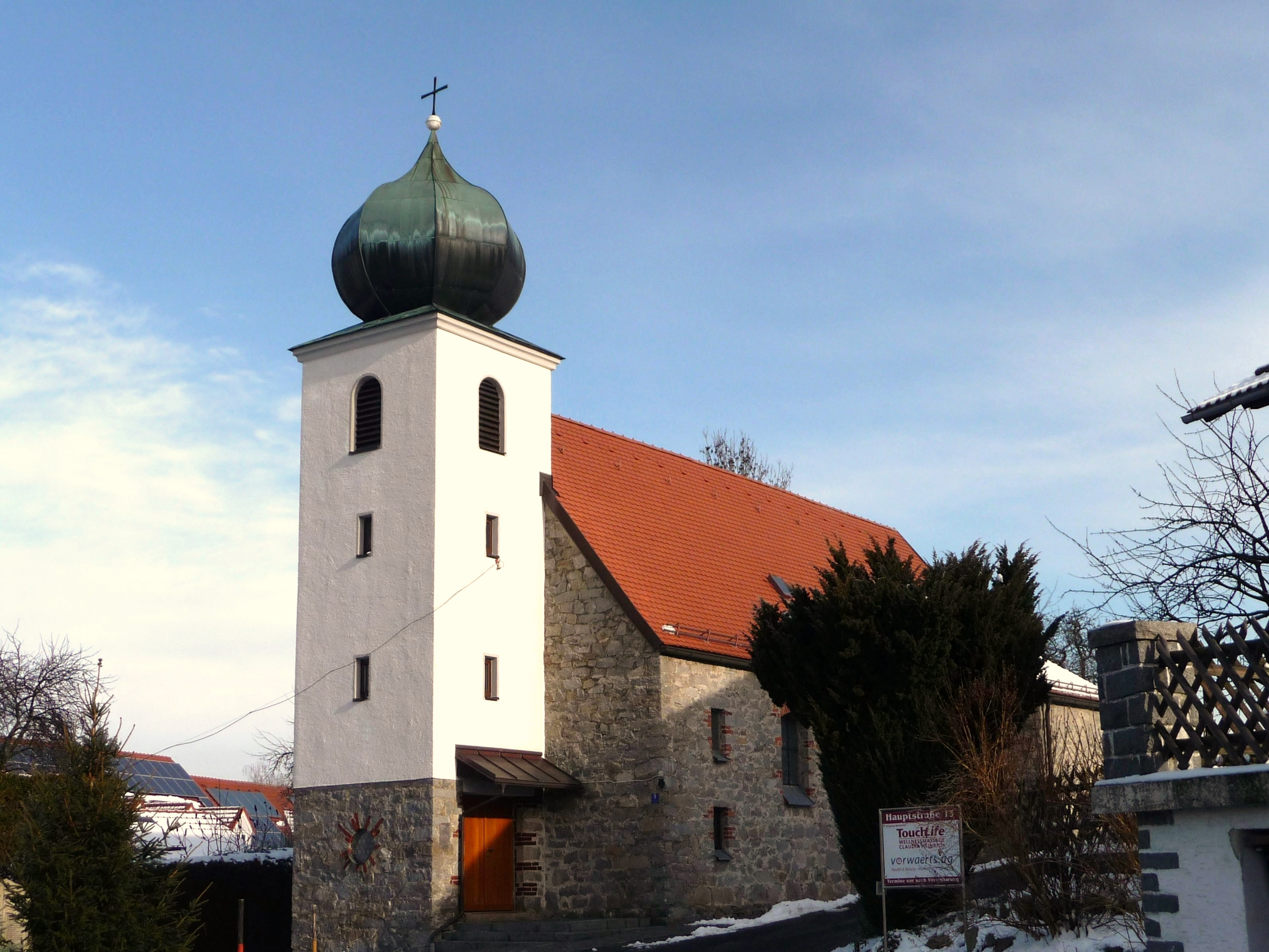 Die Filialkirche St. Michael in Eberhardsreuth, Gemeinde Schönberg (Niederbayern)